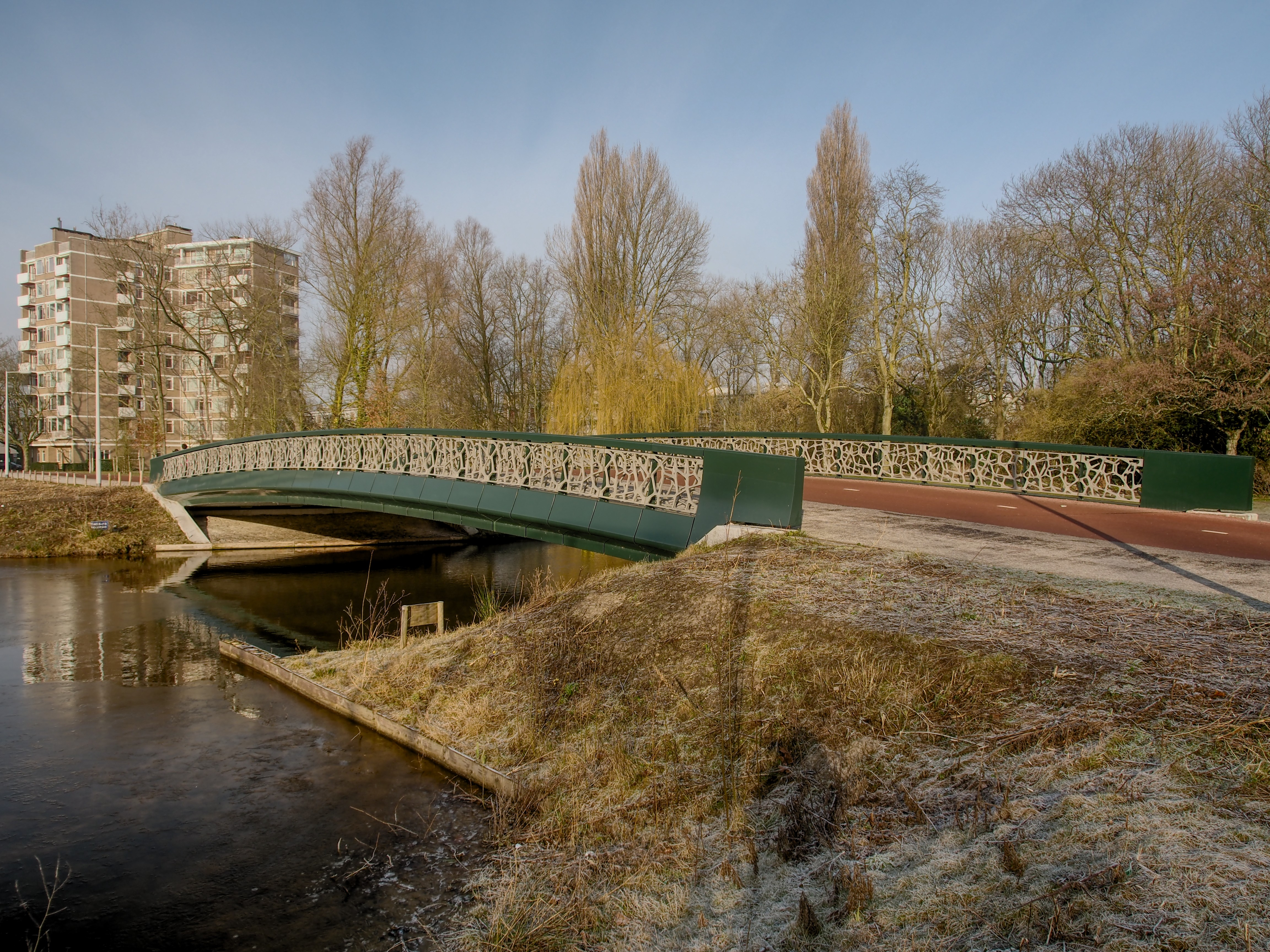 Prinses Irenebrug in het Beatrixpark bij de Prinses Irenestraat met Princesseflat op de achtergrond